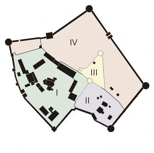 Схема Кирилло-Белозерского монастыря по частям